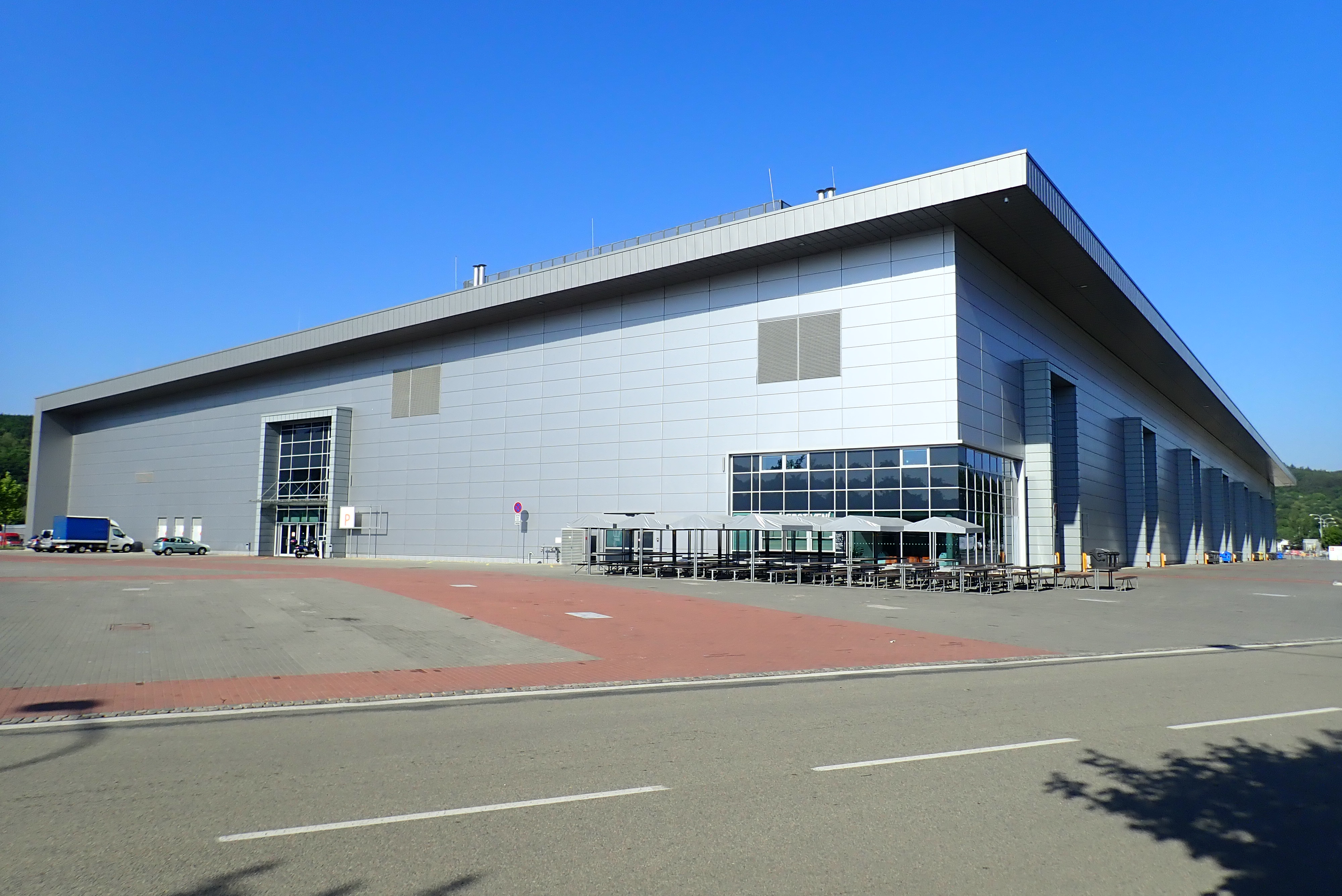 Pavilon P